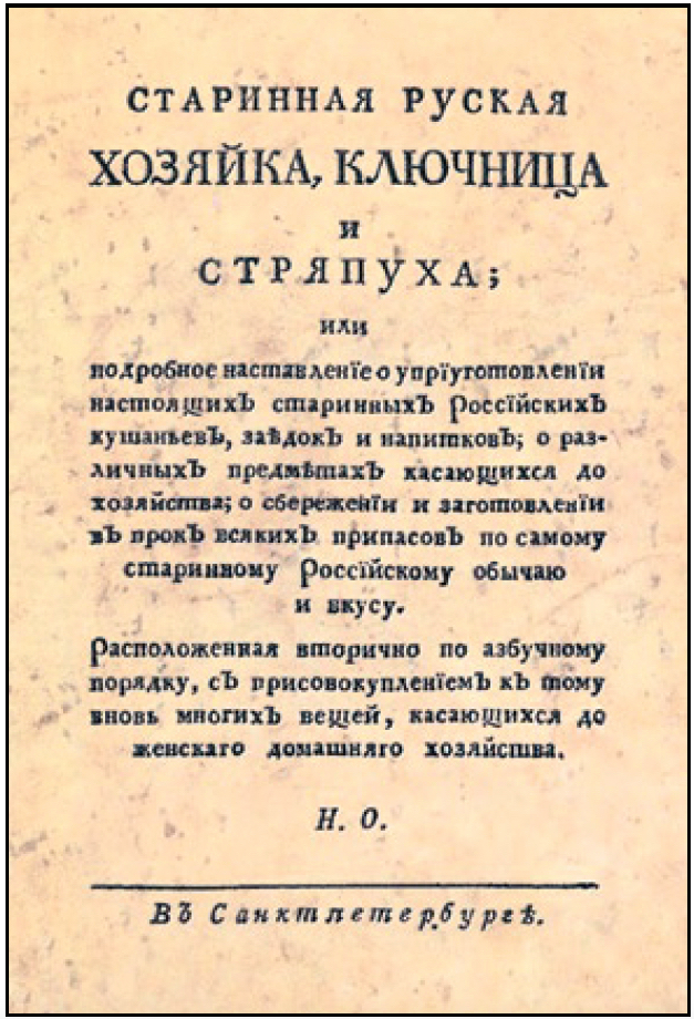 Титульный лист книги Н. П. Осипова «Старинная русская хозяйка, ключница и стряпуха; или подробное наставление о приготовлении настоящих старинных российских кушаний, заедок и напитков; о различных предметах, касающихся до хозяйства; о сбережении и заготовлении впрок всяких припасов по самому старинному российскому обычаю и вкусу». — СПб, 1790.